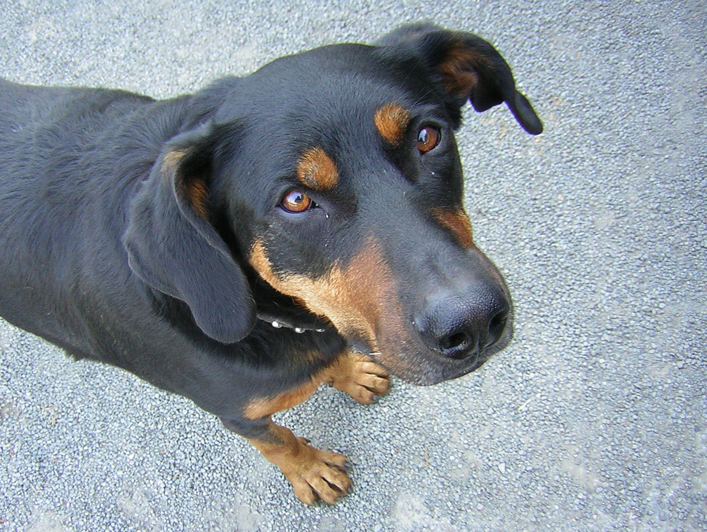 A Beauceron